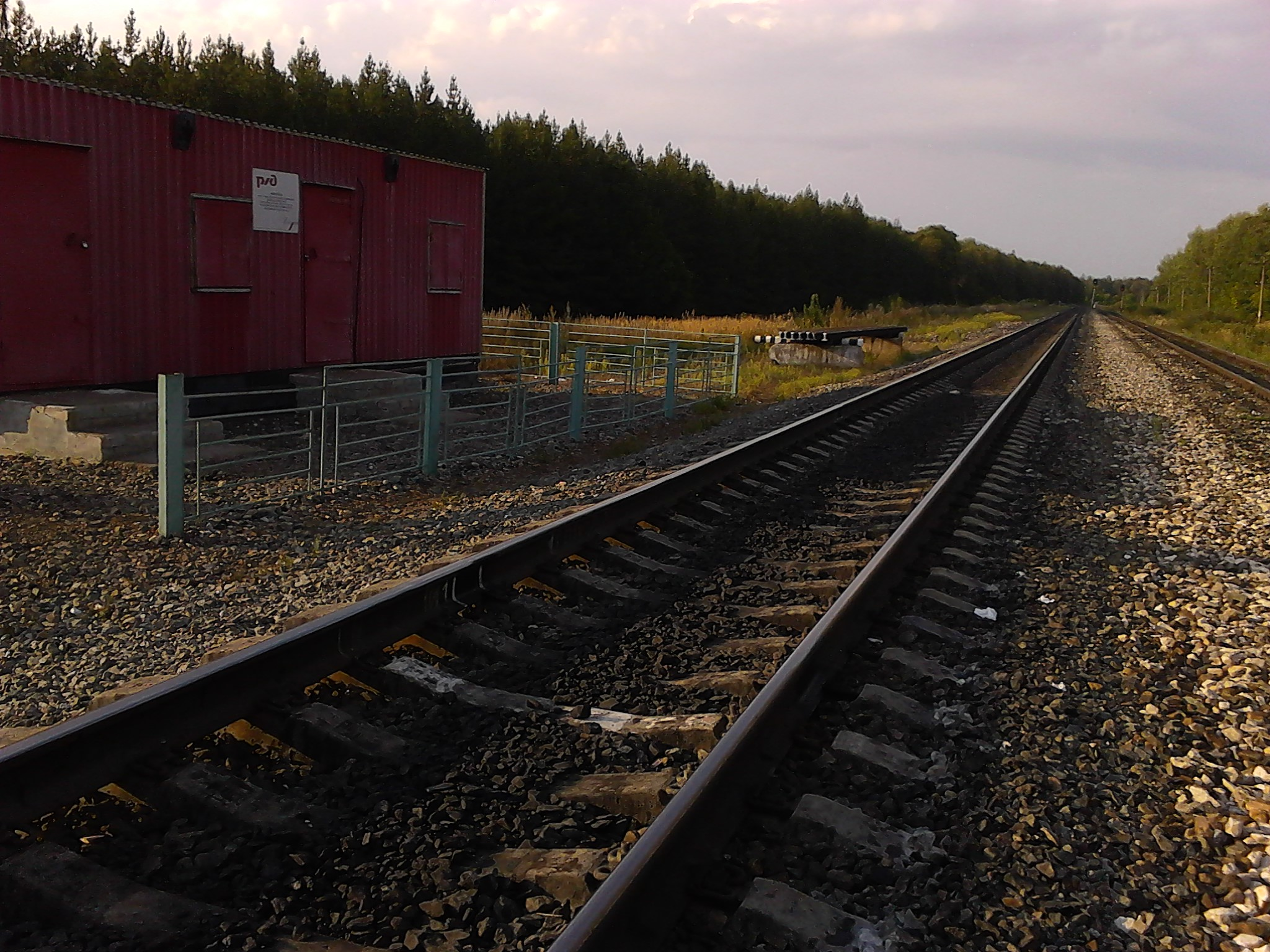 Путь 275 км ГЖЖ